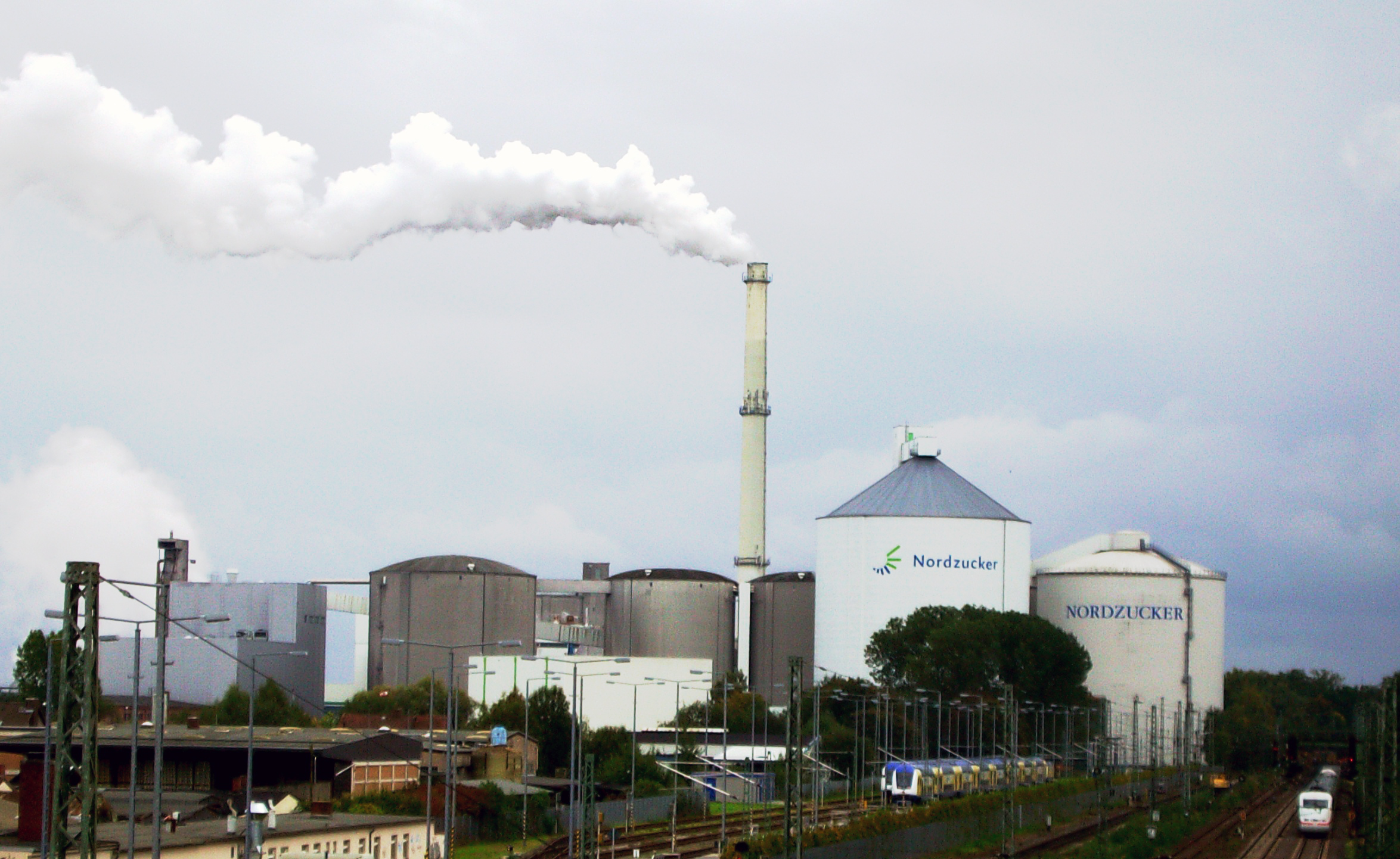 Zuckerfabrik Uelzen der Nordzucker AG an der Bahnlinie Hannover-Hamburg